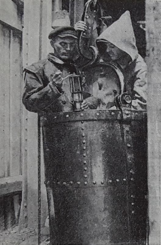 Спуск шахтеров в шахту ДонЮГРО. Чистяково